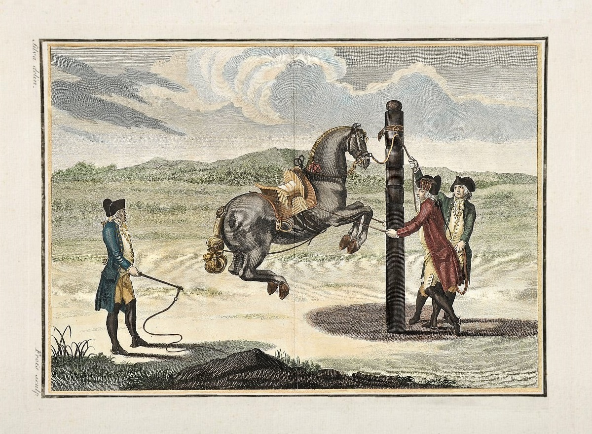 Luz da Liberal e Nobre Arte da Cavallaria, Estampa LXXVII, p. 396 (1790)